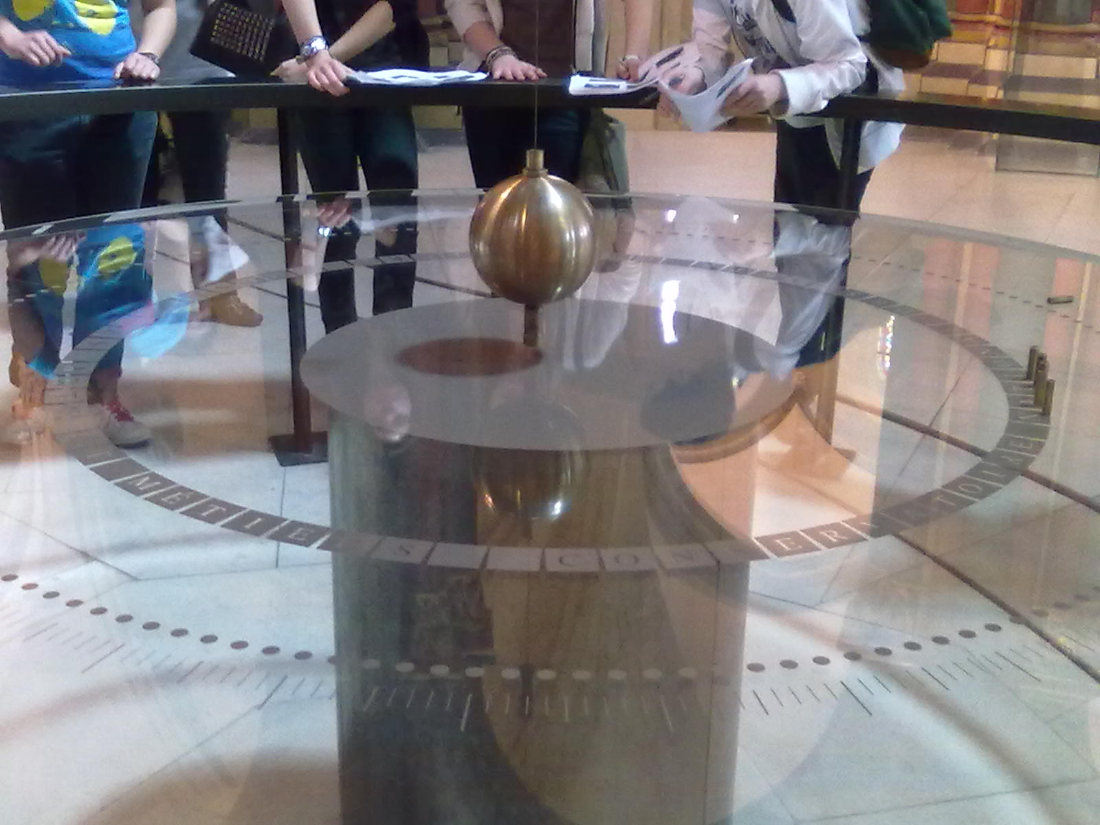 Un des pendules de Foucault, relatif aux expériences sur la courbure sphérique de la Terre et sa rotation.